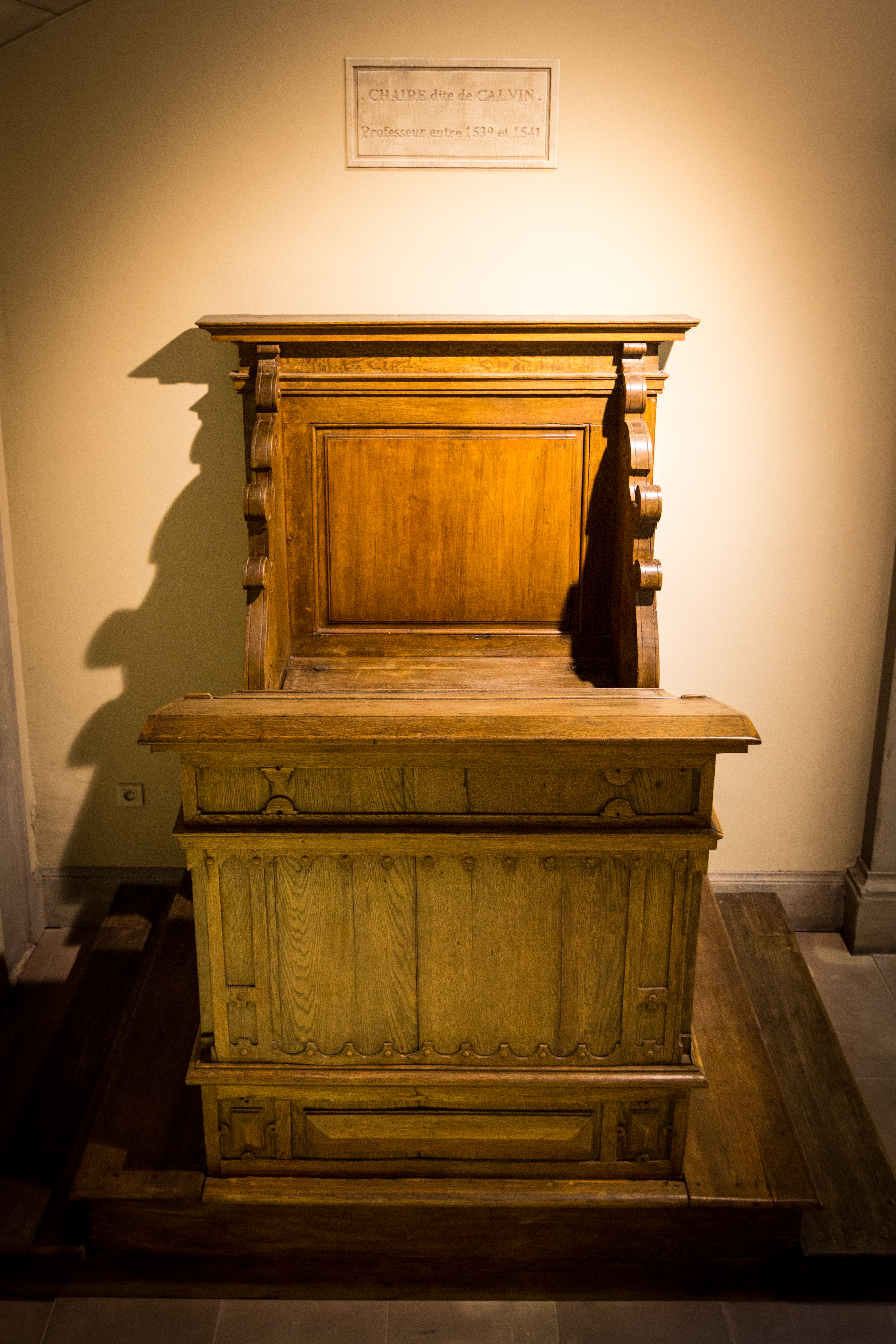 Strasbourg Gymnase Jean-Sturm avril 2014